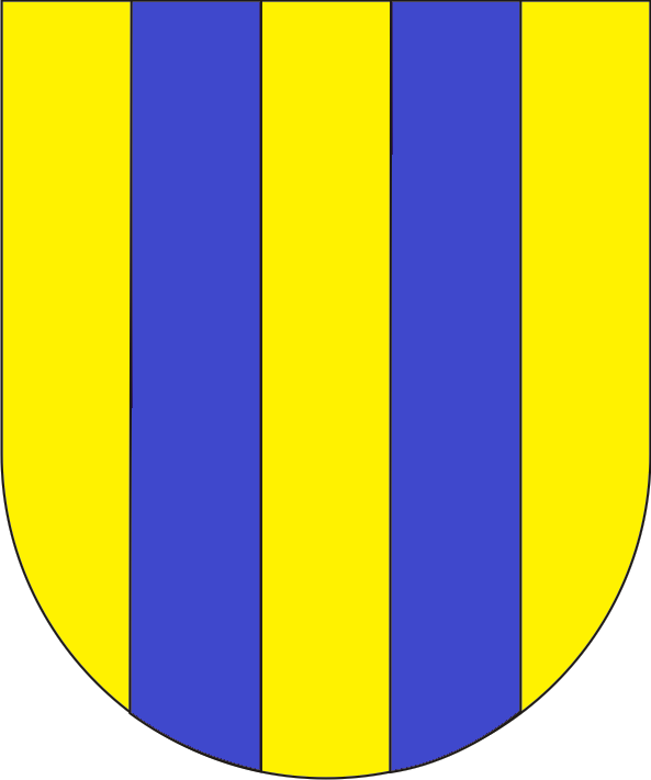 coats of arms of markgraviat of Landsberg